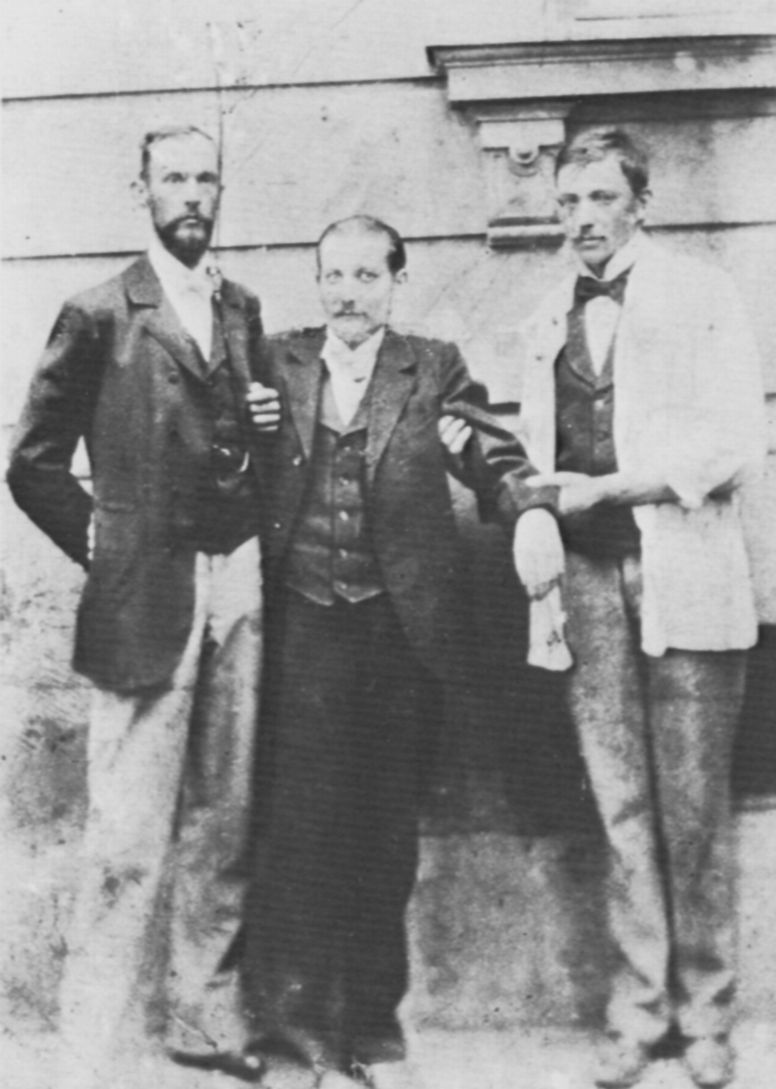 Originale Bildunterschrift: Die beiden Krankenpfleger halten den »Schachermüllerhias«: Kneißl war so schwer verletzt, dass er alleine nicht mehr stehen konnte.